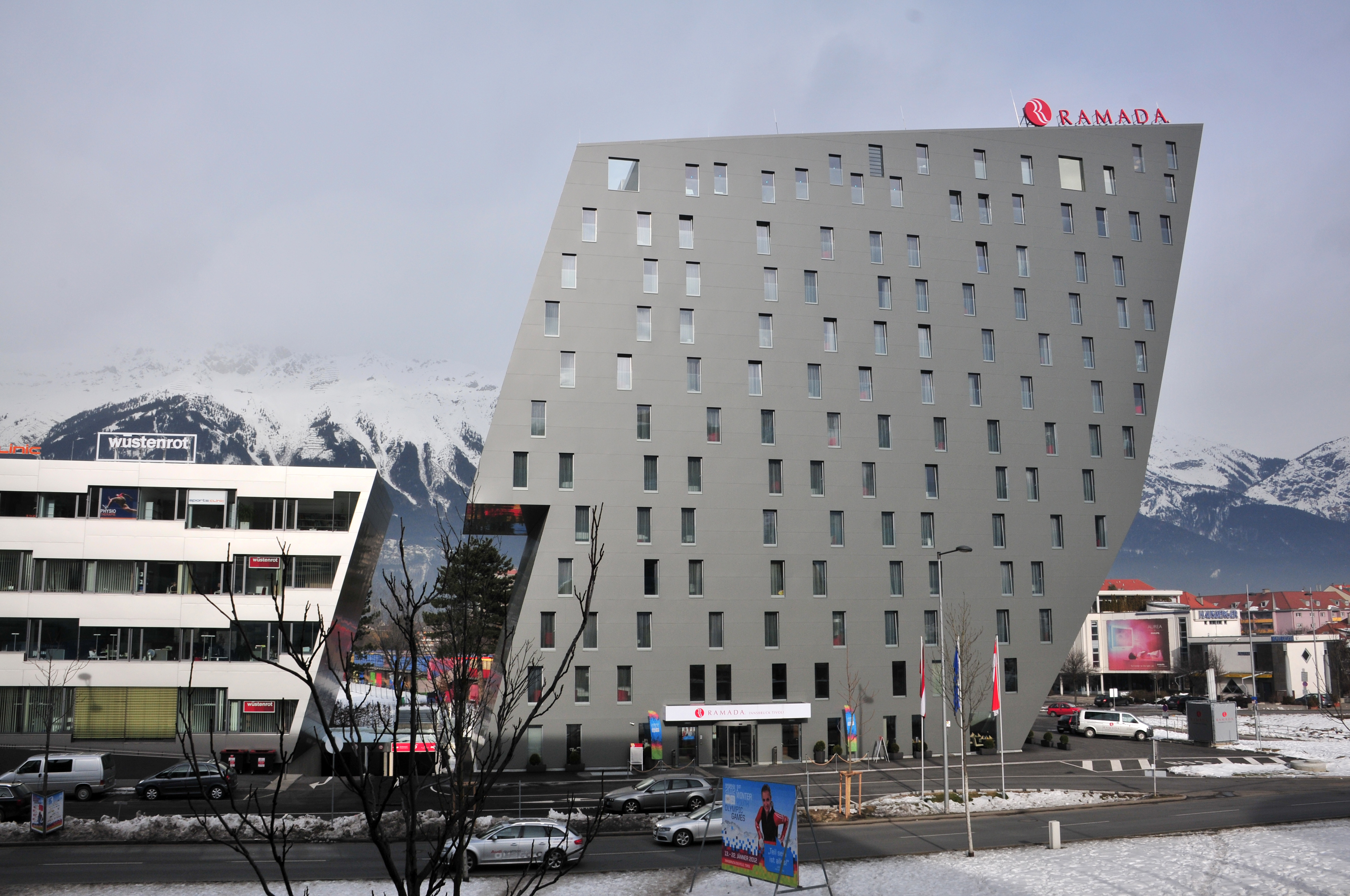 1. Jugendolympiade 2012 Innsbruck Erste Olympische Jugend- Winterspiele 201213. bis 22. Jänner in Innsbruck Dieses Foto wurde durch die Unterstützung von Wikimedia Österreich und die Twoonix Software GmbH ermöglicht.